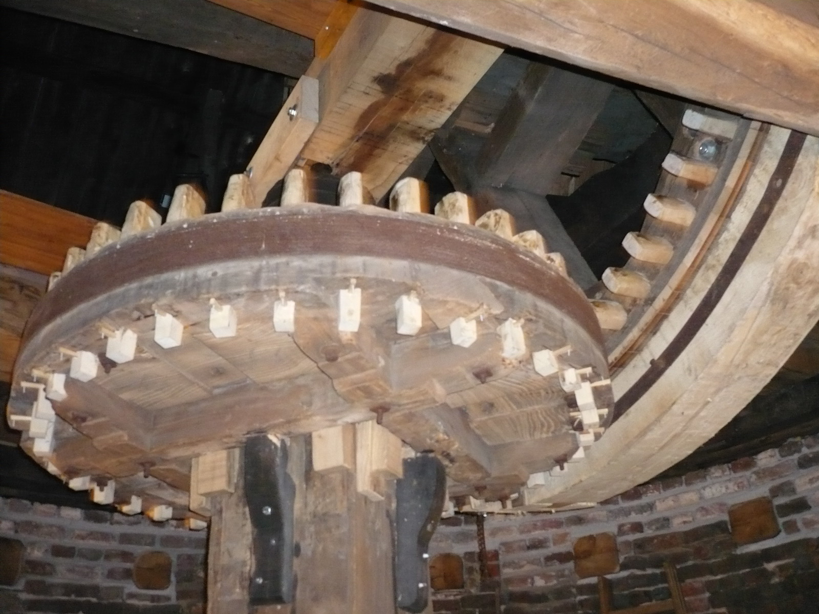 Flügelwelle, Kammrad, Kronrad und Königswelle der Geismühle